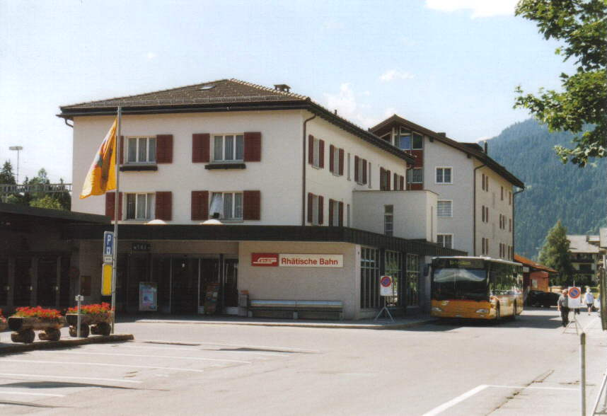 Bahnhof Klosters-Platz, Kanton Graubünden, Schweiz.